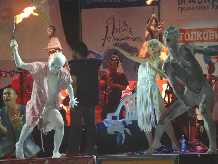 Shibusashirazu Orchestra in jazz-festival "Jazz-Koktebel 2005"